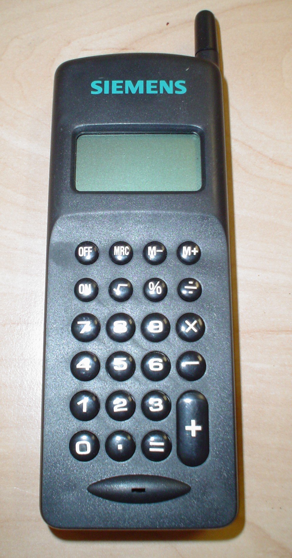 Pseŭdotelefono. Rigardu pli atente: (kalkulilo)